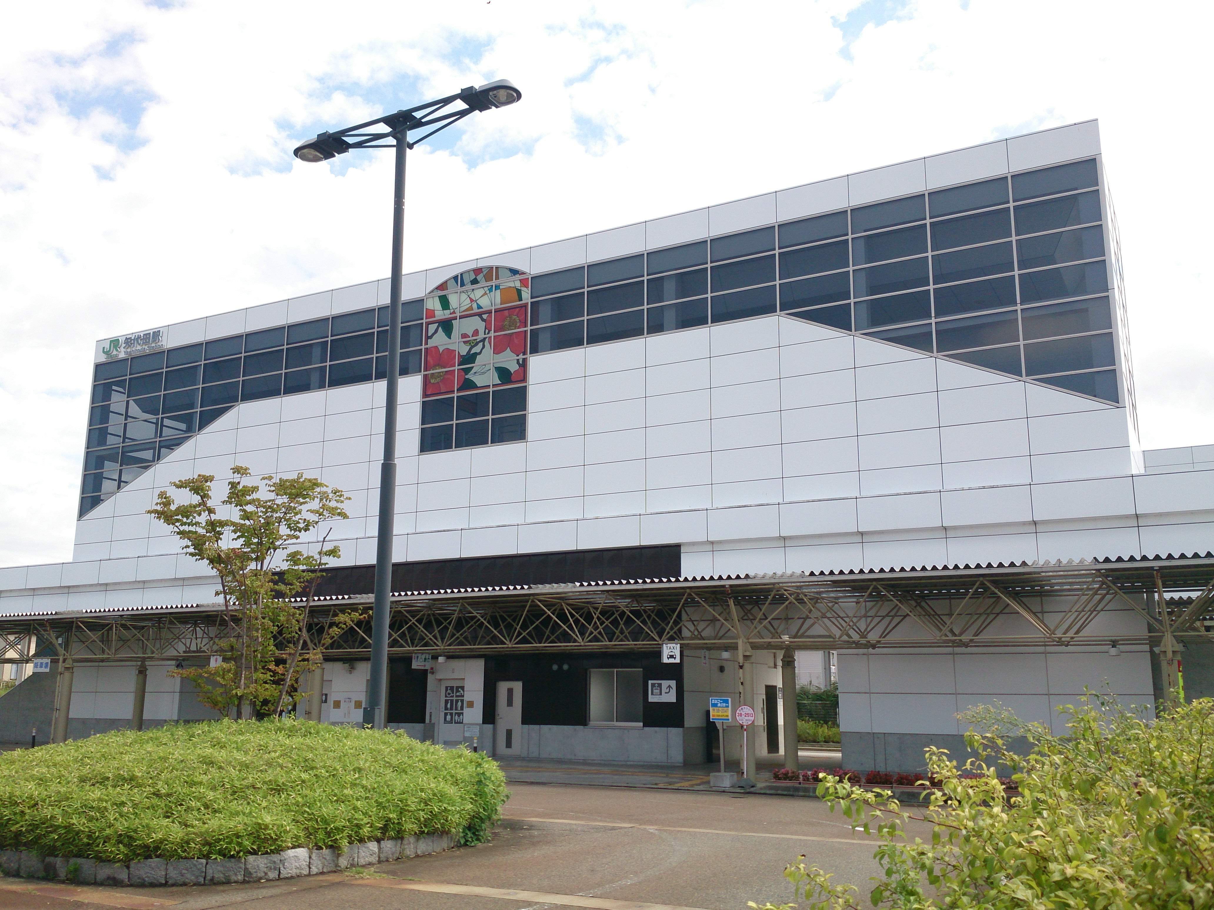 矢代田駅西口側駅舎